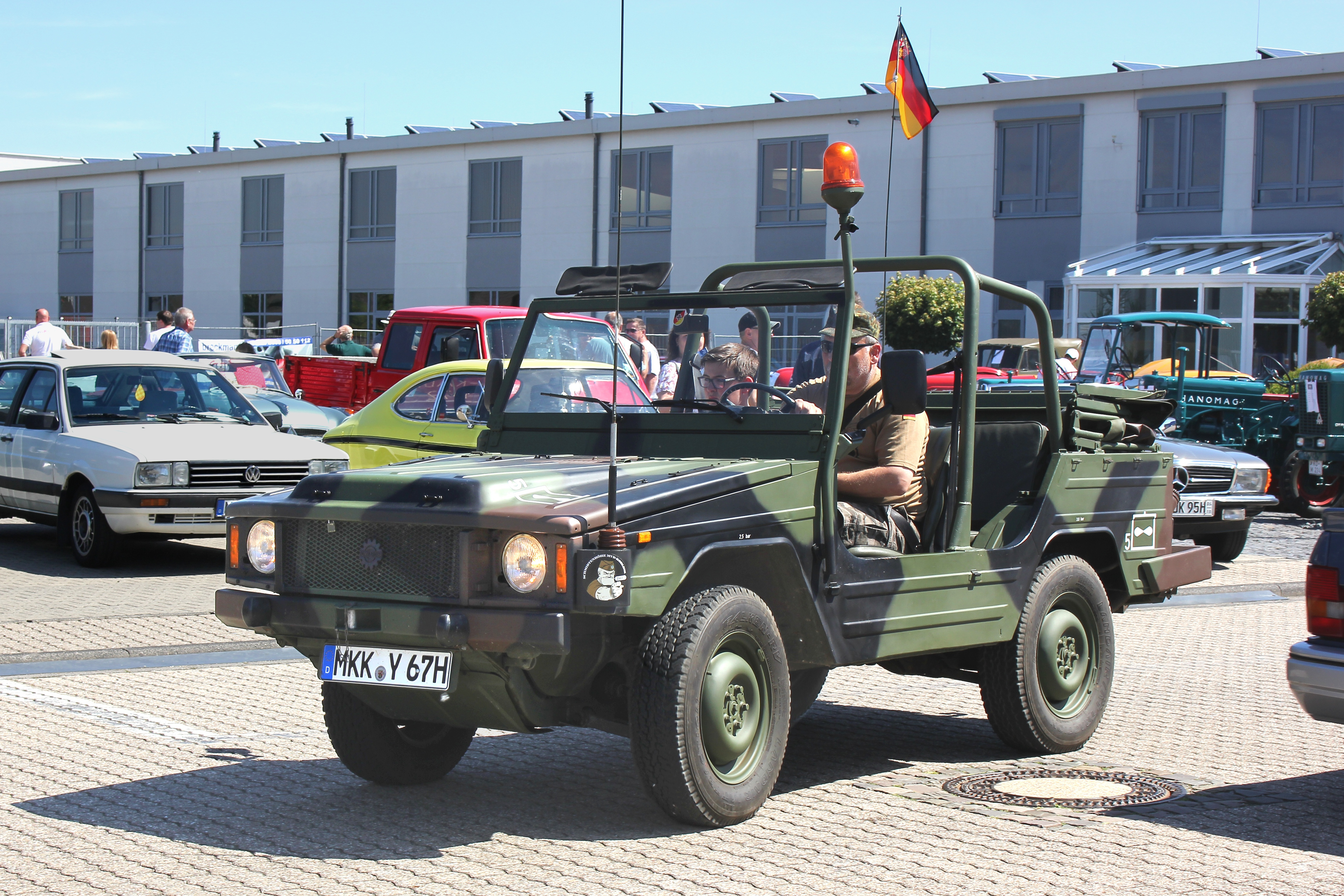 Bombardier-Geländewagen. Das Modell ist ein Lizenzbau des VW Iltis, nachdem dessen Produktion eingestellt worden war.